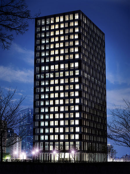 LifeCycleTower Modell